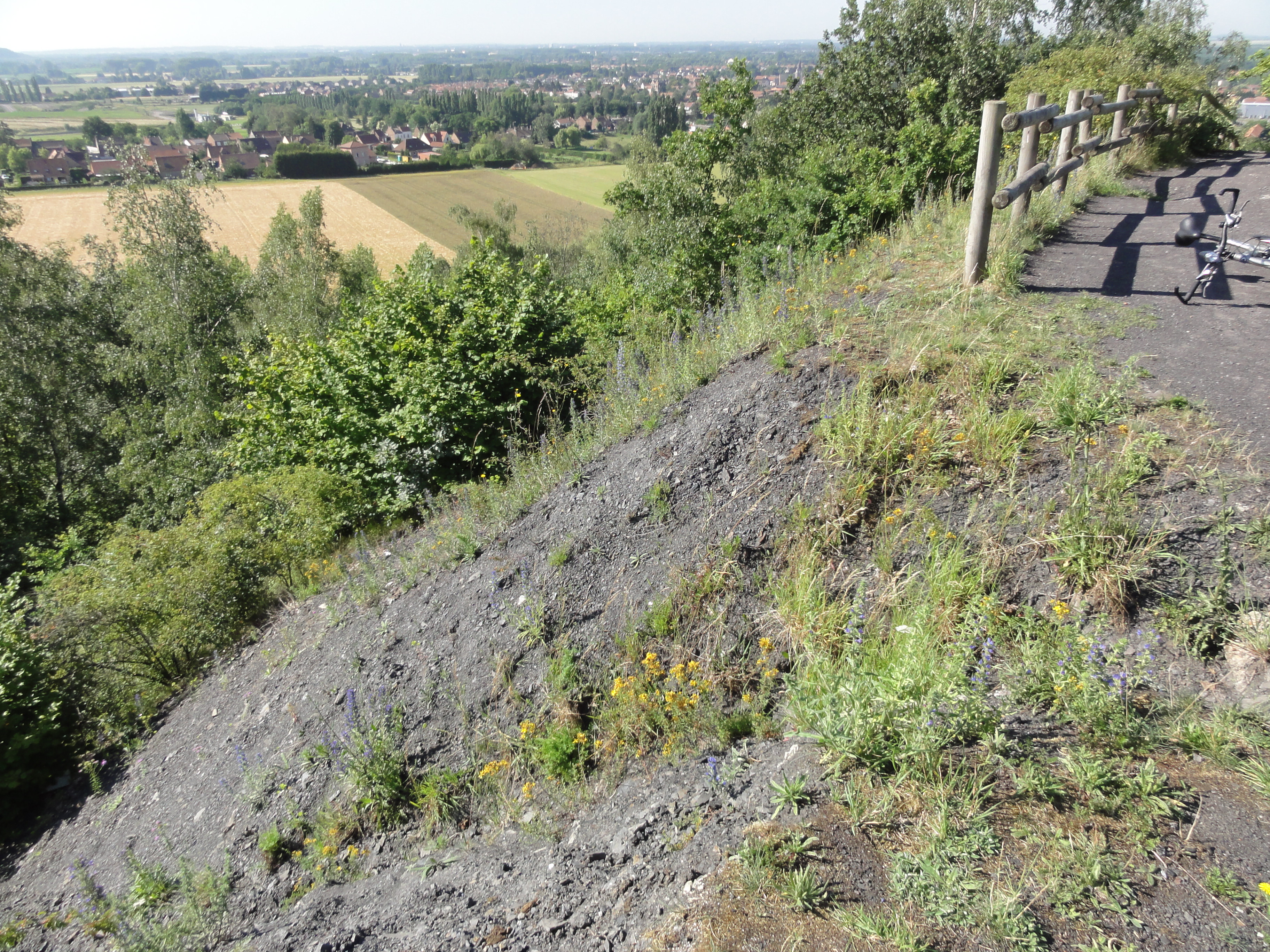 Terril n° 122 dit 10 de l'Escarpelle Est, Fosse n° 10 de la Compagnie des mines de l'Escarpelle, Leforest, Pas-de-Calais, Nord-Pas-de-Calais, France.